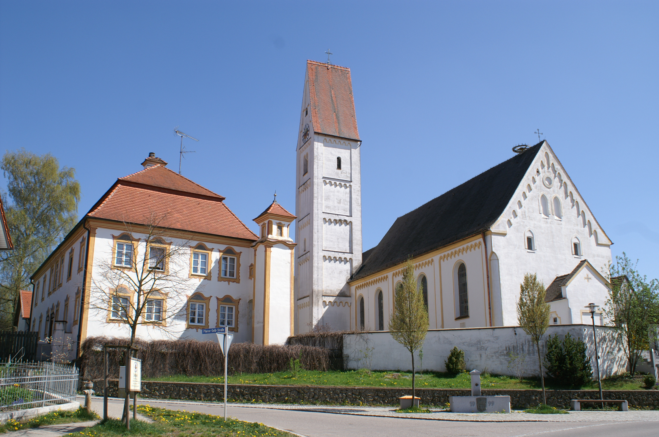 Kirche und Pfarrhof in Zaisertshofen, Tussenhausen